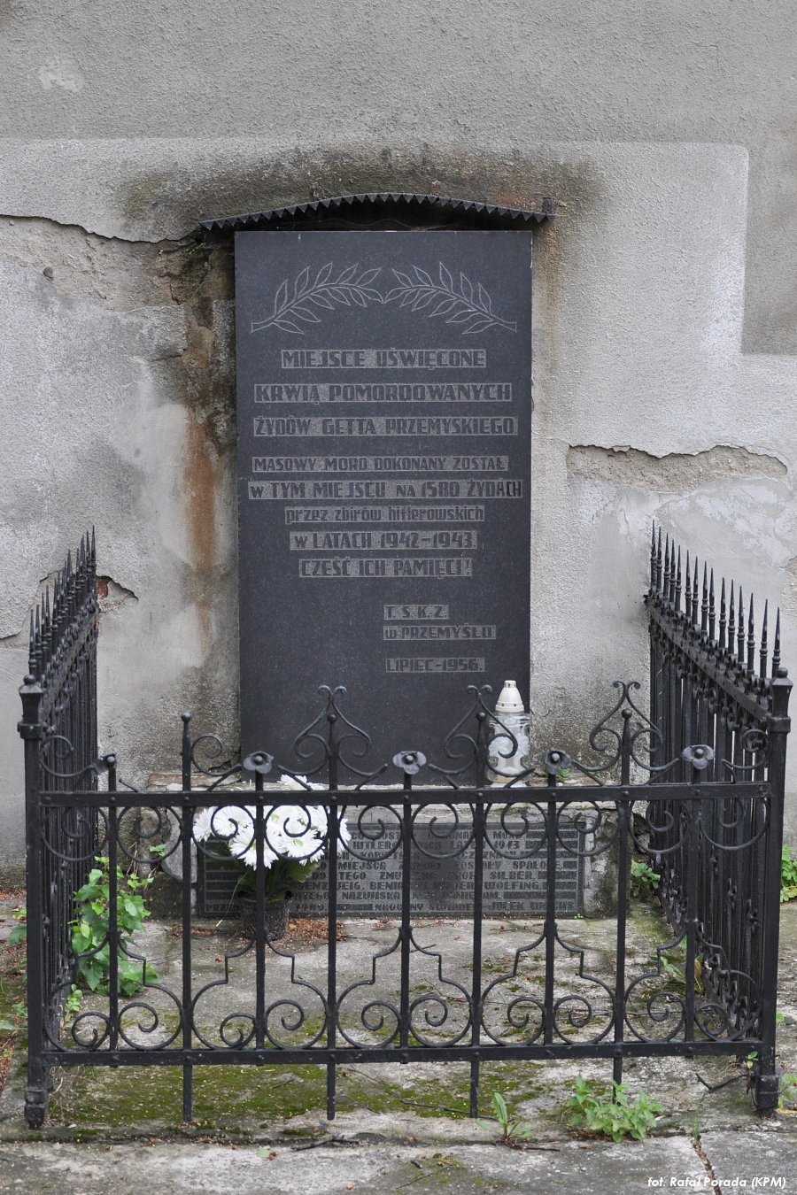 Tablica pamiątkowa ku czci Żydów zamordowanych w Przemyślu znajdująca się na zapleczu siedziby Judenratu przy ul. Kopernika 14.